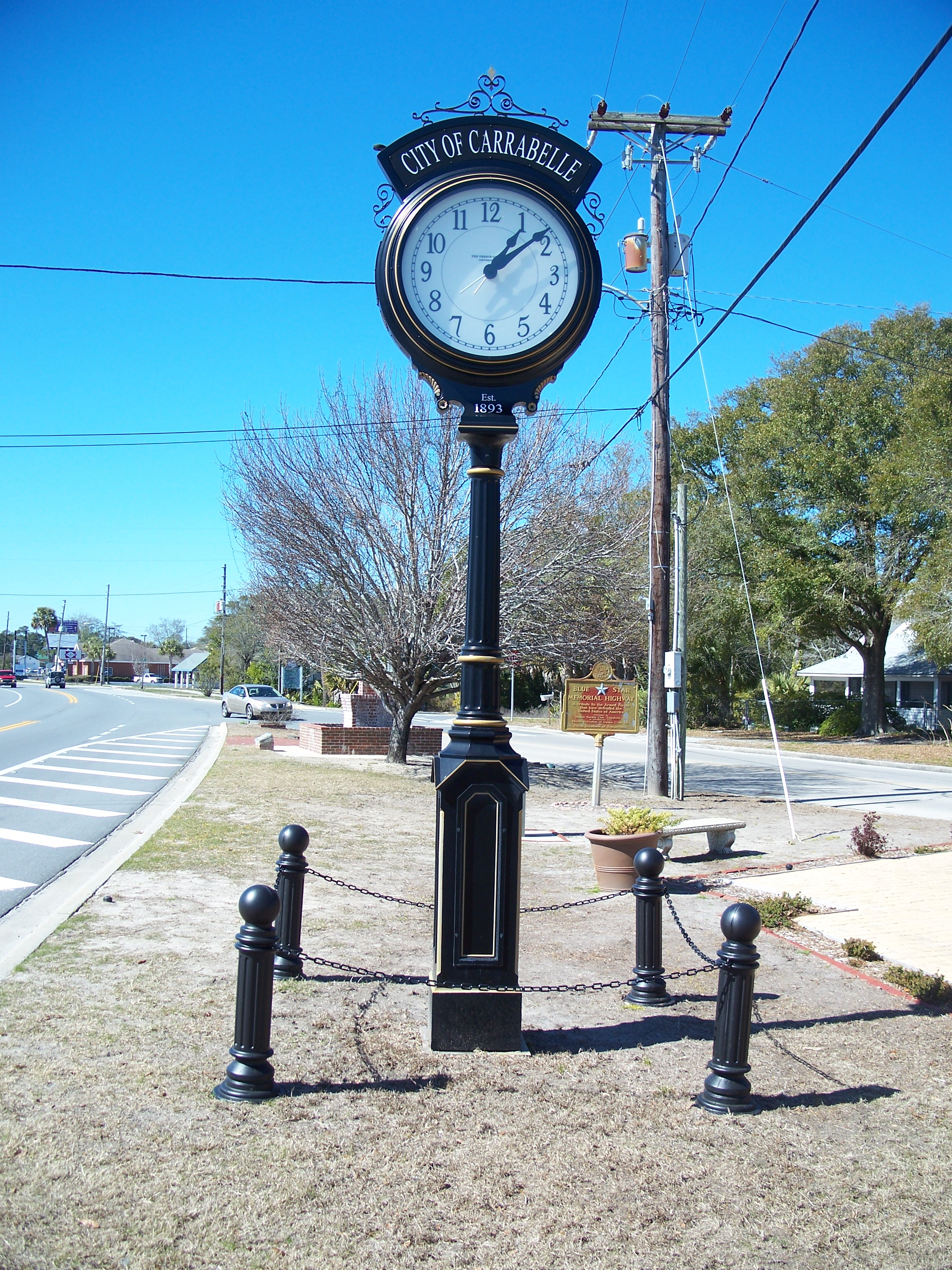 Carrabelle, Florida: Clock